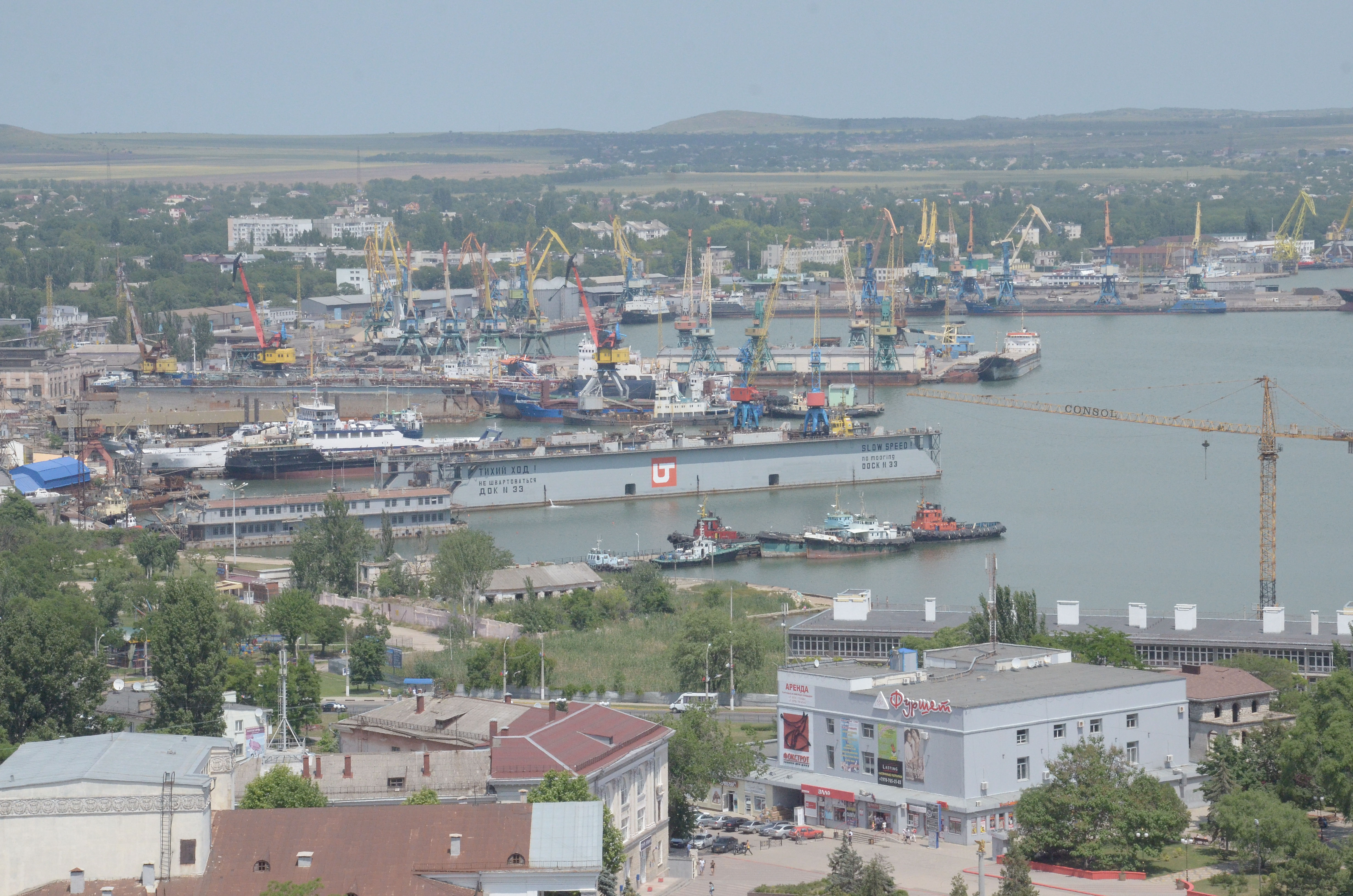 Керчь